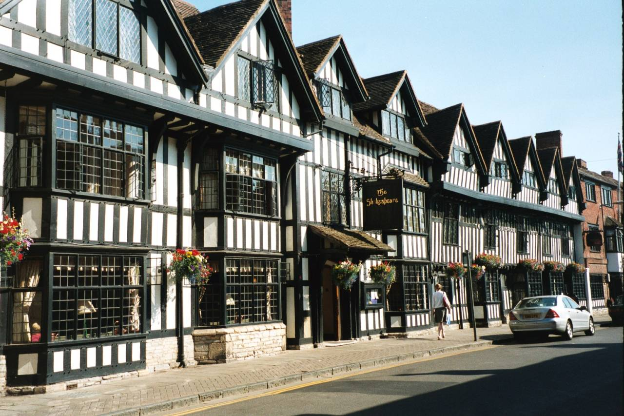 Stratford upon Avon, historische Bauten